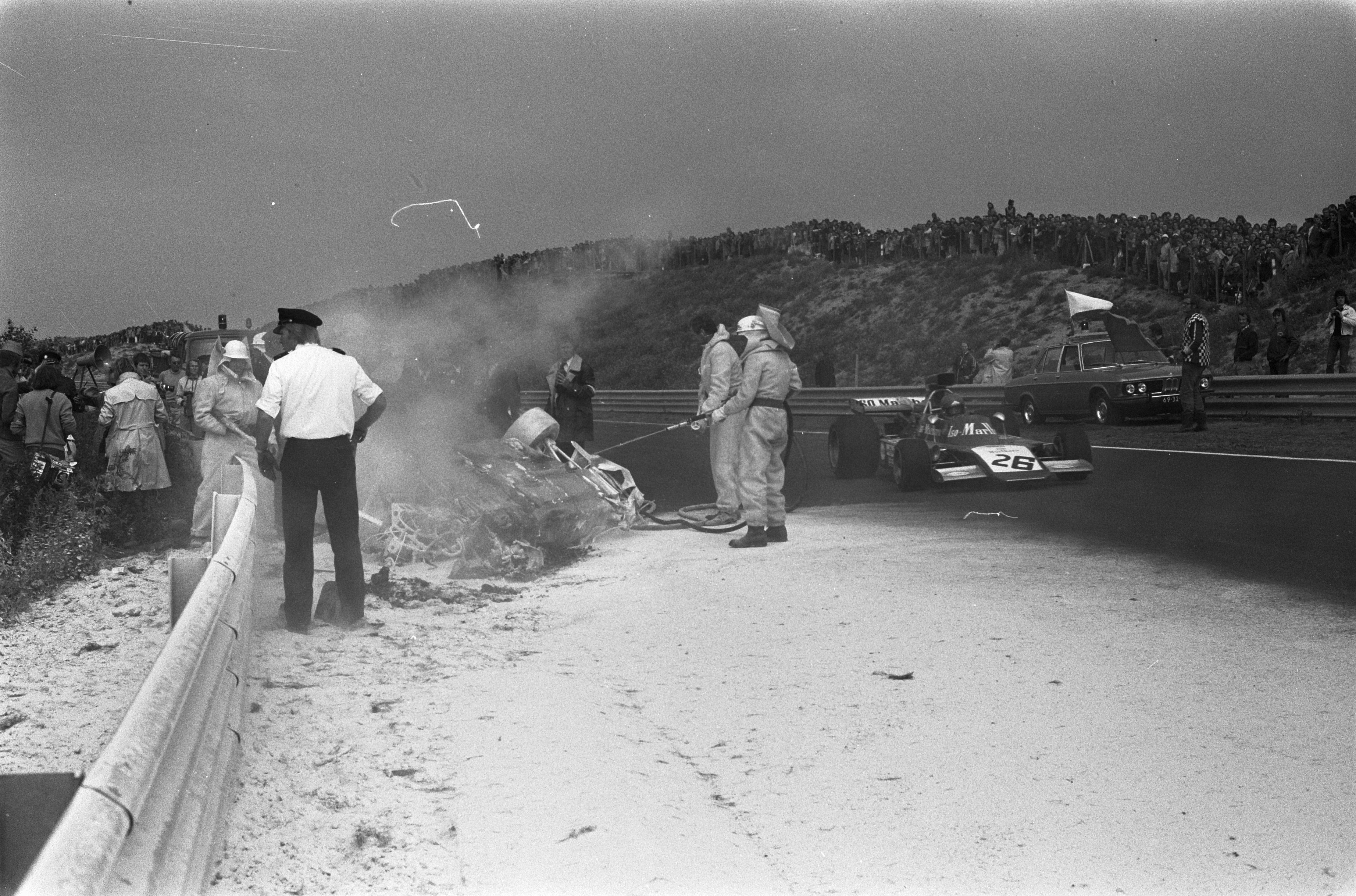 Grote Prijs van Nederland voor Formule I wagens op circuit Zandvoort, Gijs van Lennep passeert verongelukt wagen.